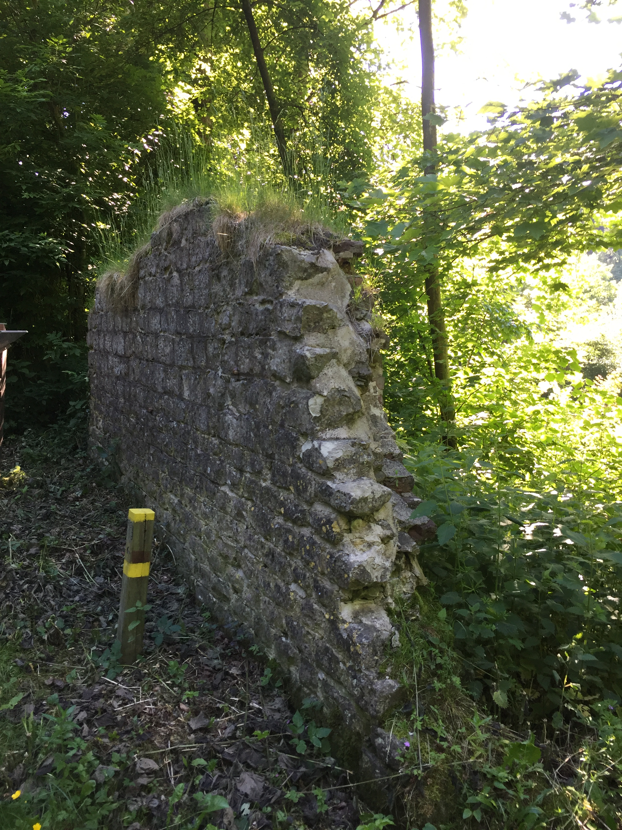 Slootmuur